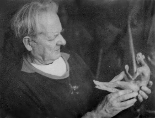 фото моего двоюродного деда, известного советского скульптора Гавриила Александровича Шульца